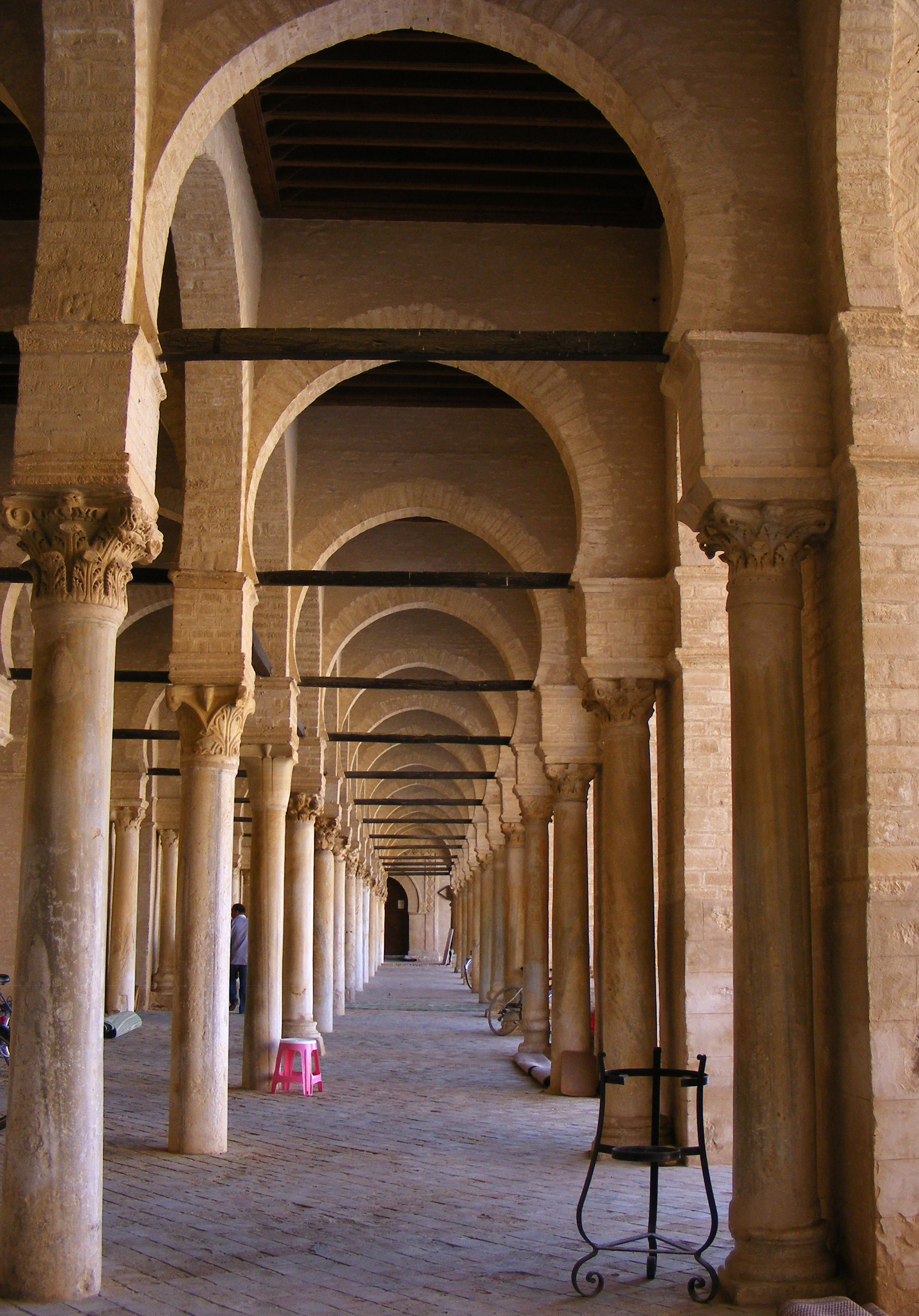 Grande Mosquée (Sidi Okba), KairouanArcades et colonnes entourant la grande cour extérieure